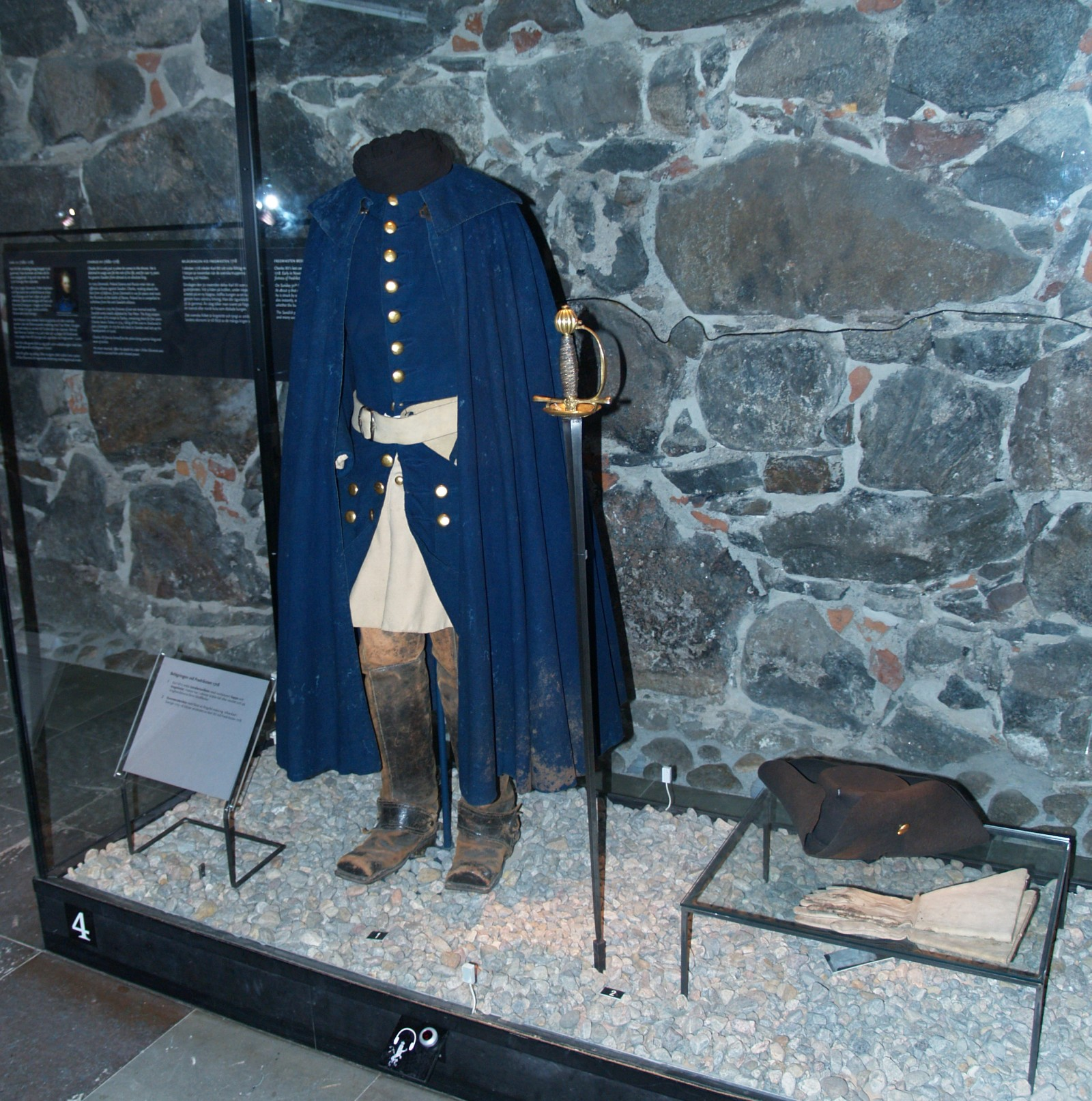 Carolus XII dress, from the "Livrustkammaren museum" at the Royal Castle, Stockholm, Sweden. Picture by myself, Ulf Larsen. Karl XII:s uniform som han bar då han dog vid Fredrikssten. Den finns till beskådande på Livrustkammaren i Stockholm. Foto av Ulf Larsen.